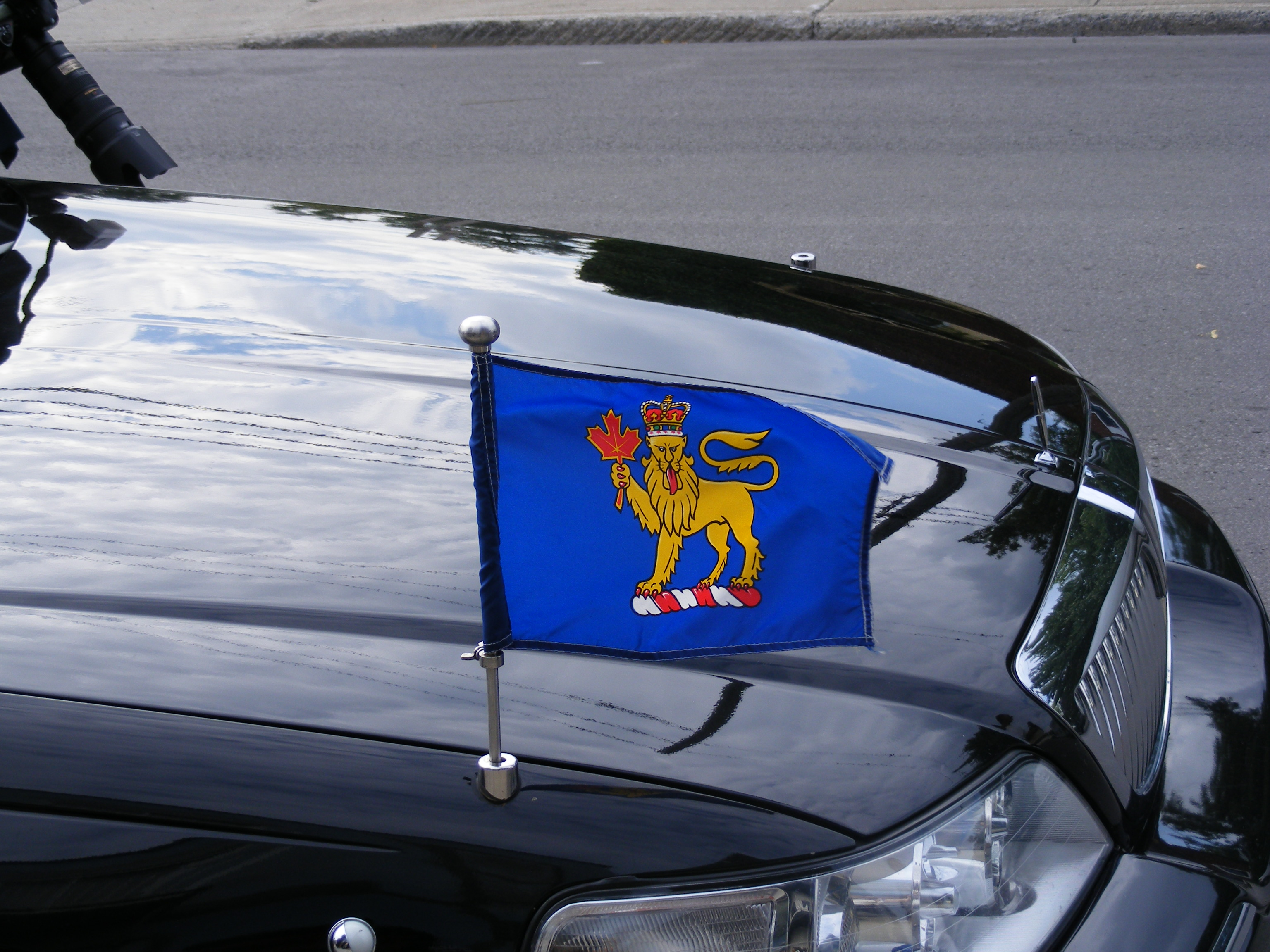 Flag of the governor-general of Canada (Vice-regal flag) Voiture de fonction de la gouverneure générale du Canada stationnée à côté de la maison des jeunes Côte-des-Neiges à Montréal